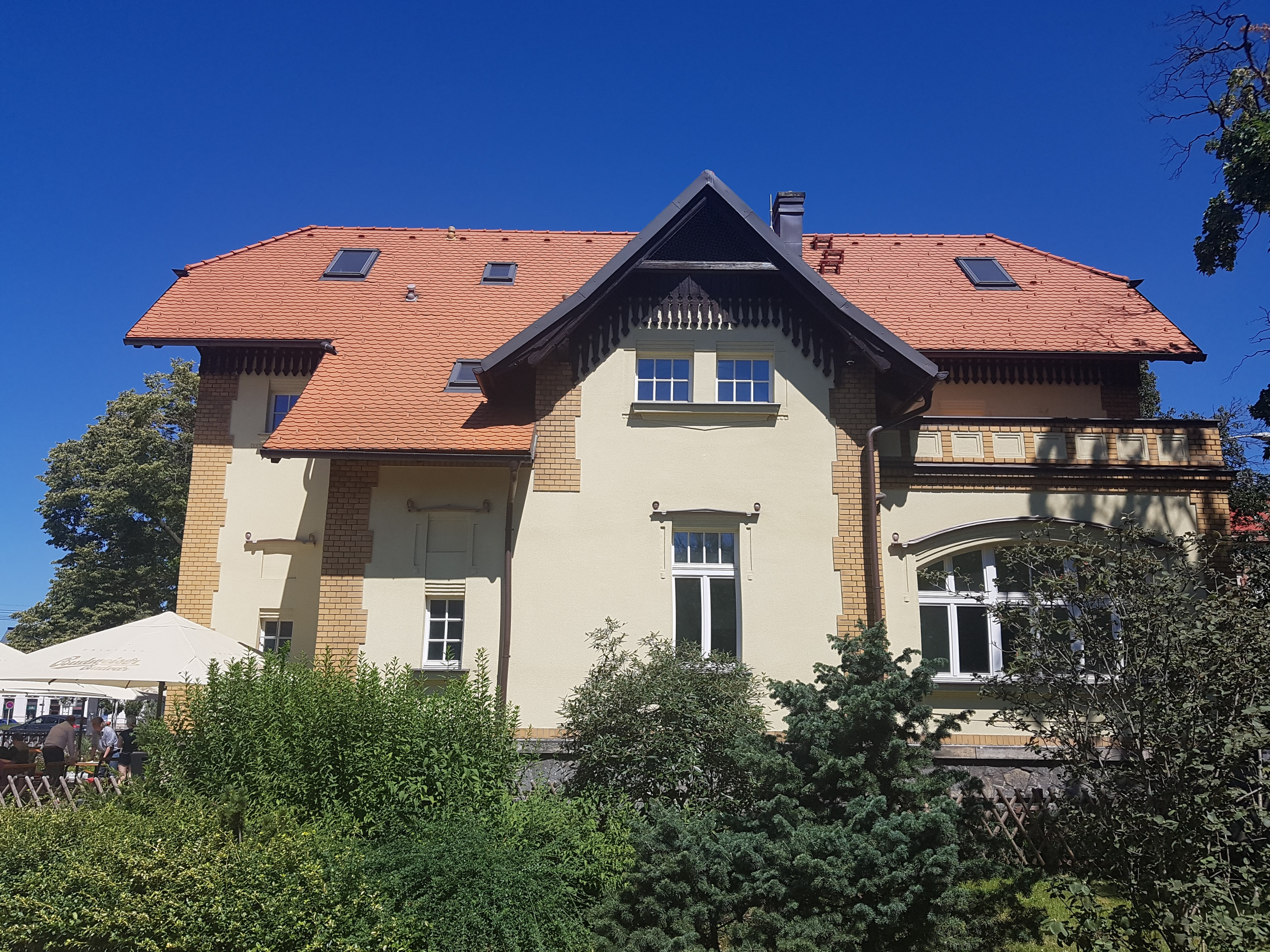 Vila Roberta Schmidta v Hradci Králové (2020)